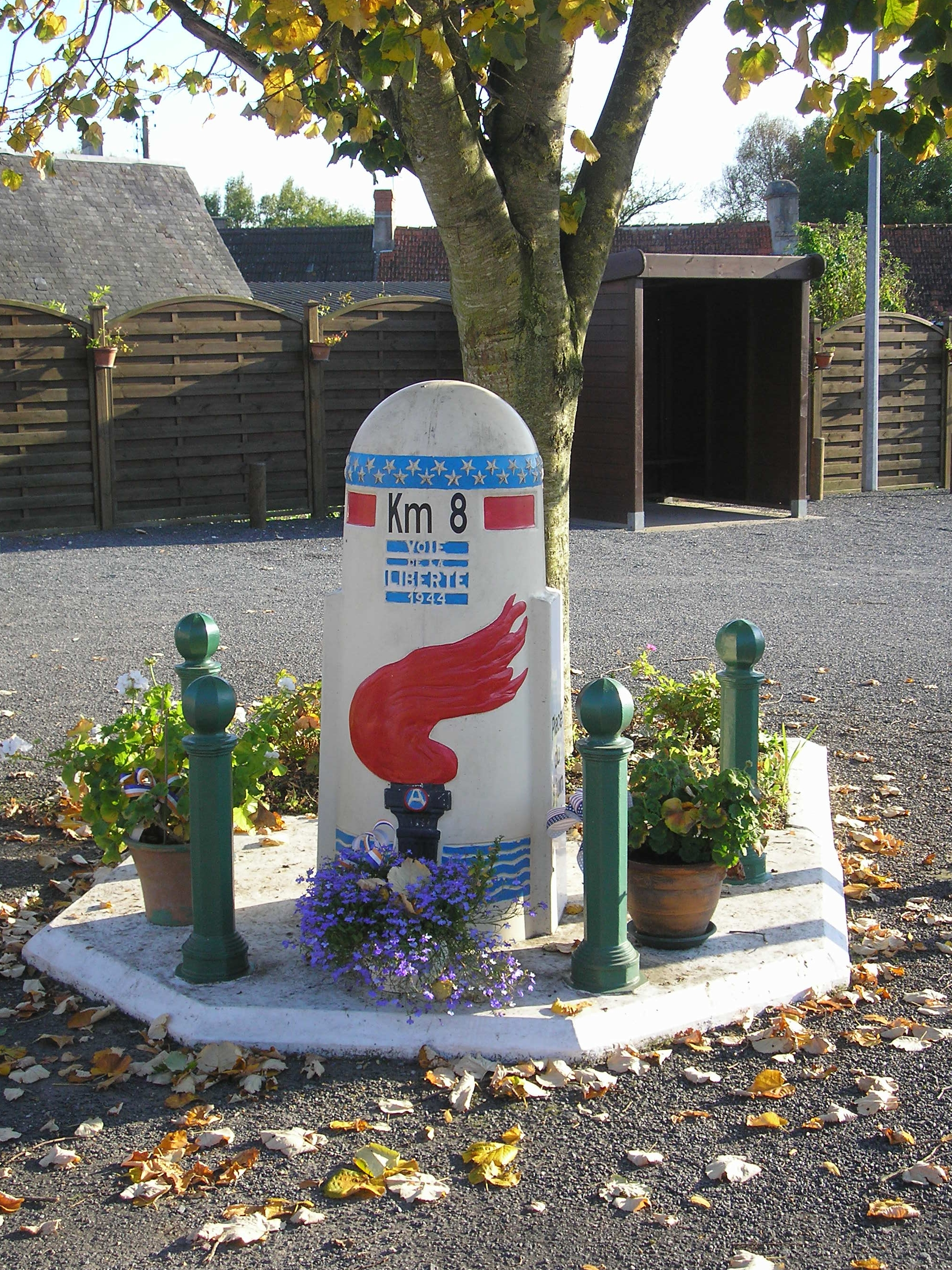 Houesville (Normandie, France). Borne de la voie de la Liberté.